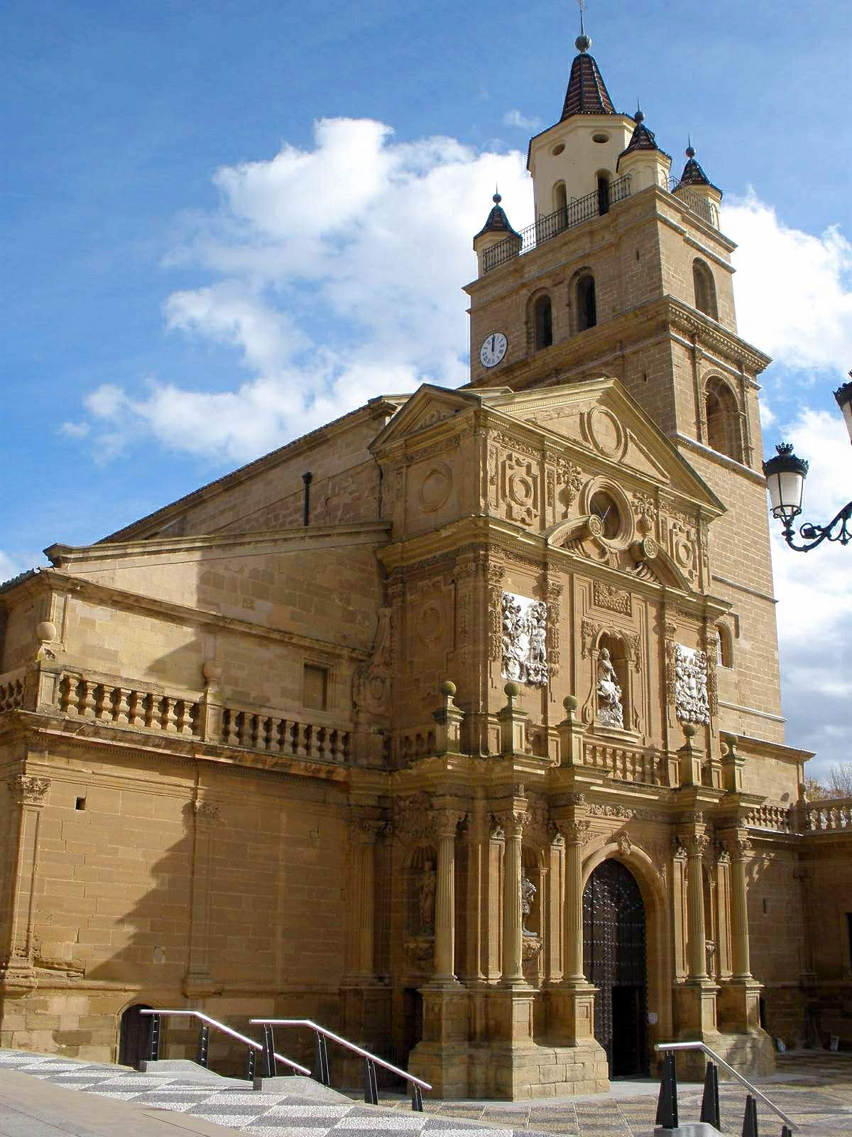 Catedral de Calahorra (La Rioja)